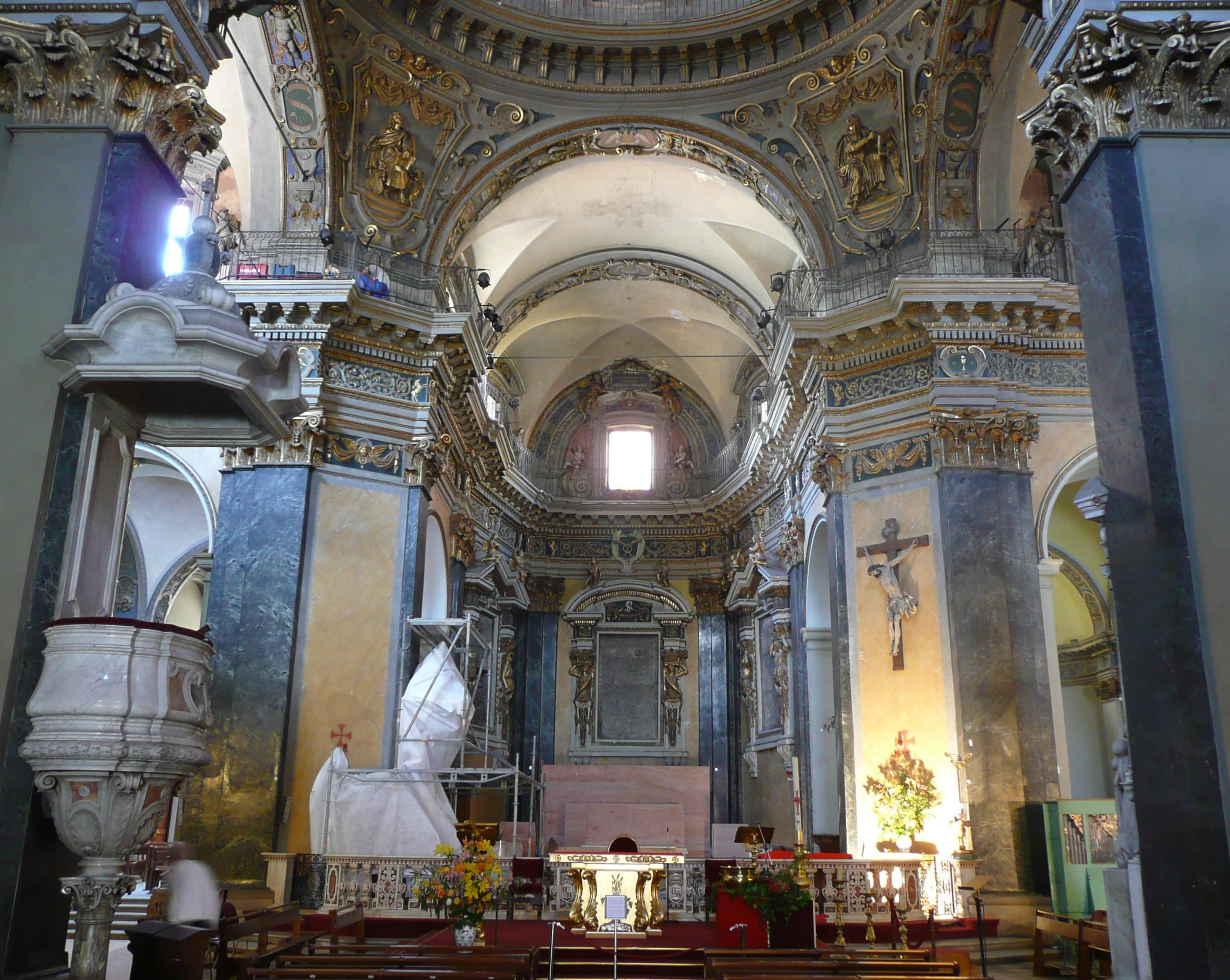 Nice (Alpes-Maritimes, France), place Rossetti, cathédrale Sainte-Réparate, croisée du transept et chaire à prêcher; au fond abside du chœur, en travaux.